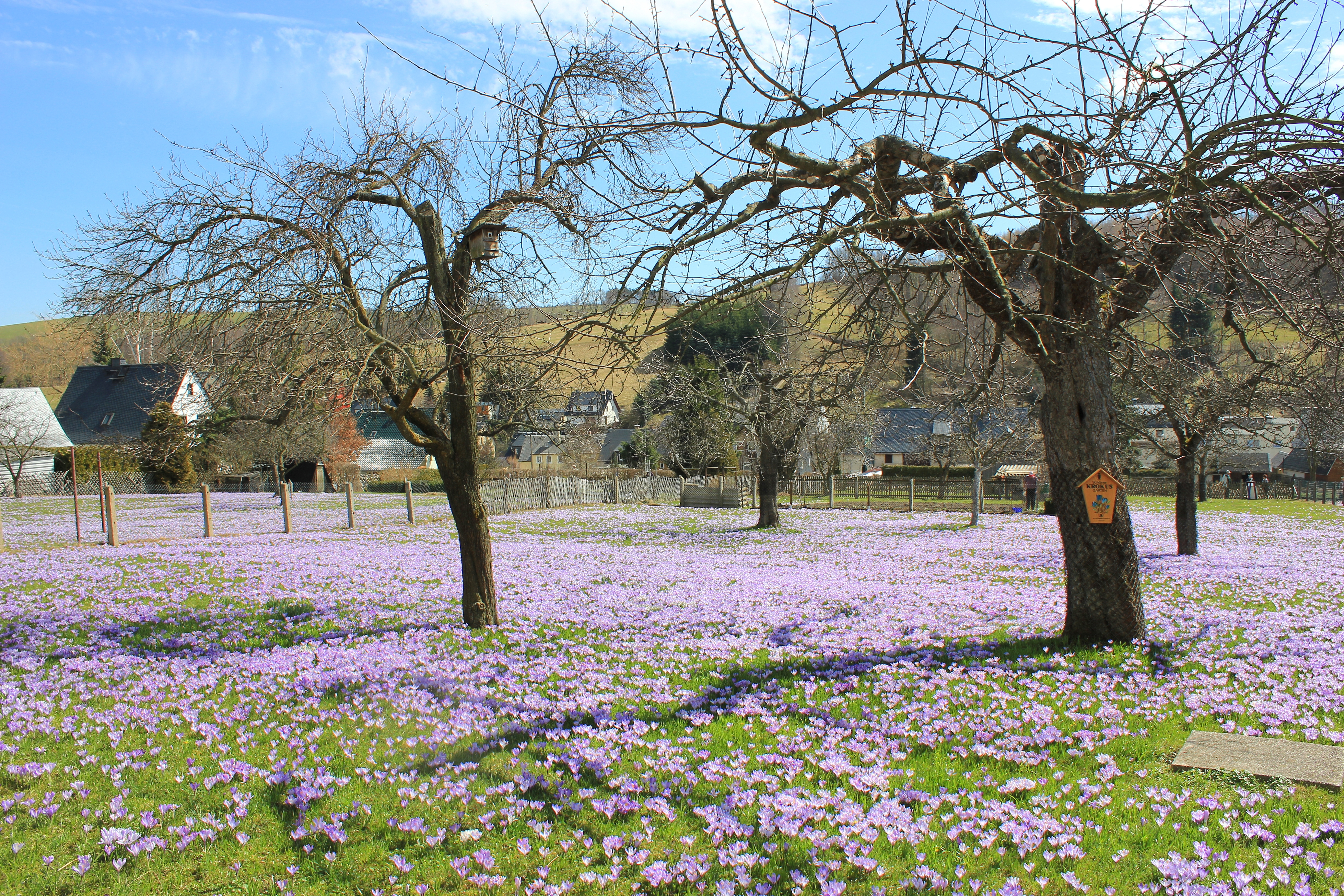 Flächen-Naturdenkmal Drebacher Krokuswiesen, 09430 Drebach, Erzgebirgskreis, Sachsen. – Jedes Jahr zwischen Anfang März bis Ende April können Sie in Drebach ein einzigartiges Naturerlebnis bewundern, die Krokusblüte. Es gibt in Drebach über 40 Flächennaturdenkmale mit insgesamt ca. 7 ha, auf denen die wild wachsenden violetten Drebacher Frühlingskrokusse, auch "Nackte Jungfern" genannt, angesiedelt sind.